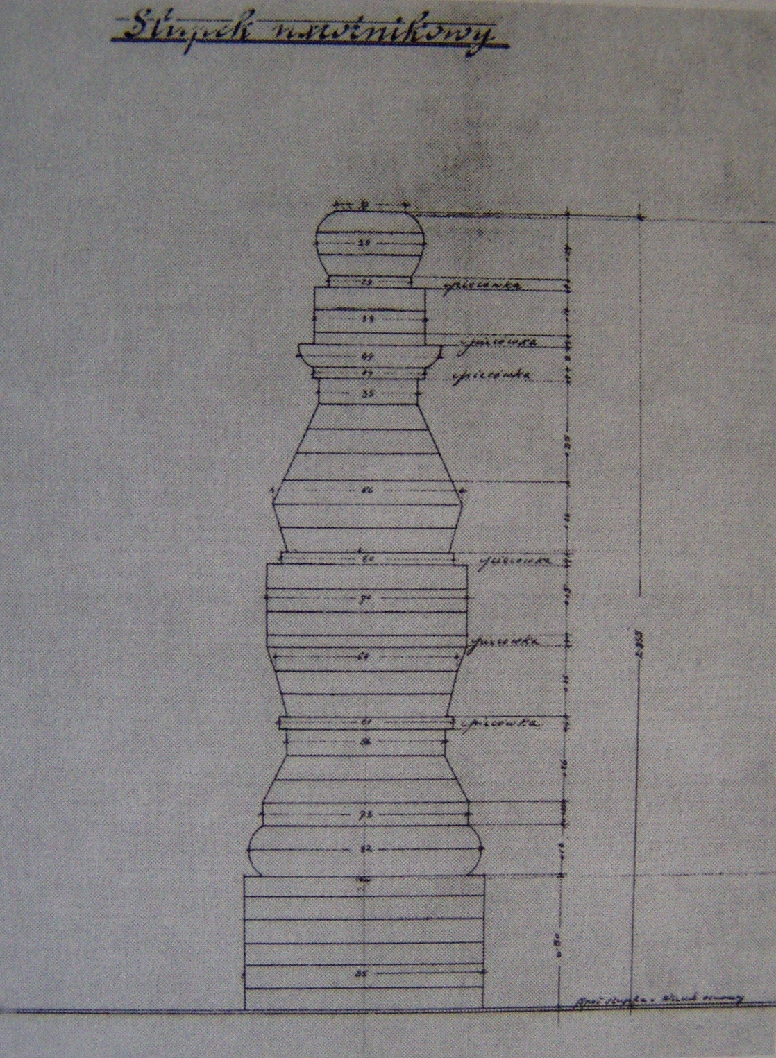 Projekt sterczyny zdobiącej attykę Starej Synagogi w Krakowie